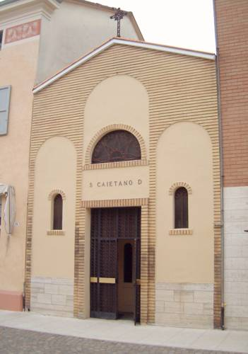 Oratorio gaetano